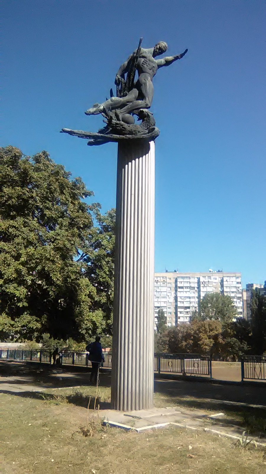 Пам'ятний знак на честь футболістів клубу «Динамо», учасників «Матчу смерті» під час Великої Вітчизняної війни, Київ, Шолуденка вул., 28/4